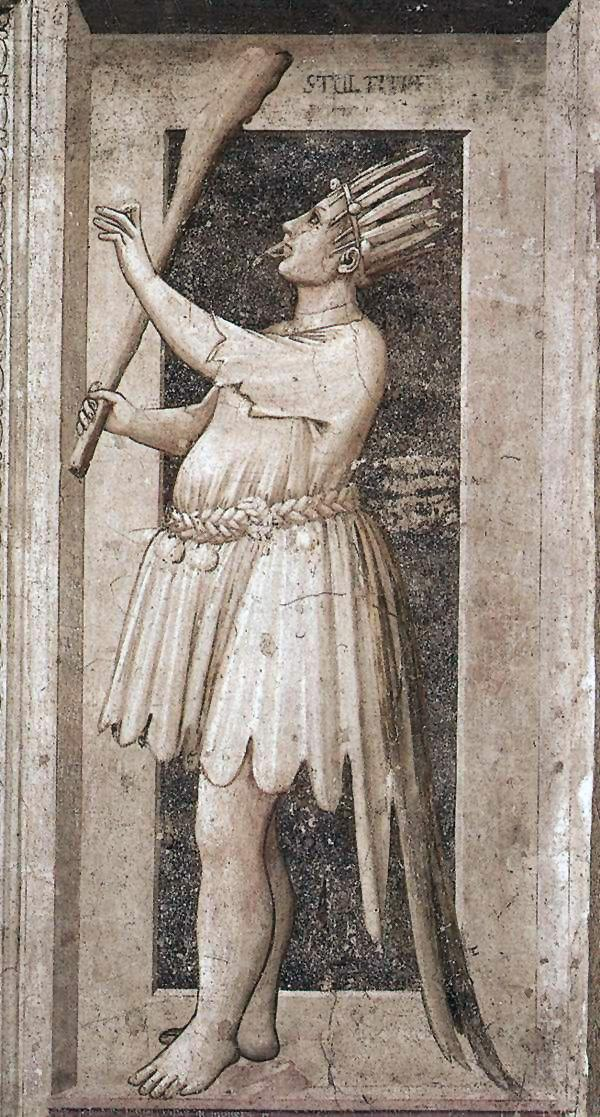 Giotto: The Seven Vices - Foolishness (1306, Fresco, 120 x 55 cm, Cappella degli Scrovegni (Arena Chapel), Padua, Italy)